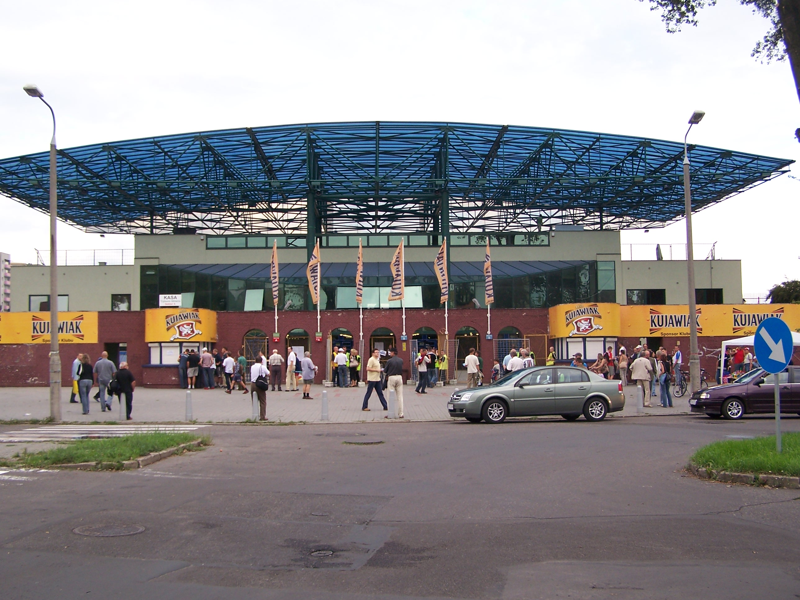 Stadion Polonii Bydgoszcz (en: Polonia Stadium)